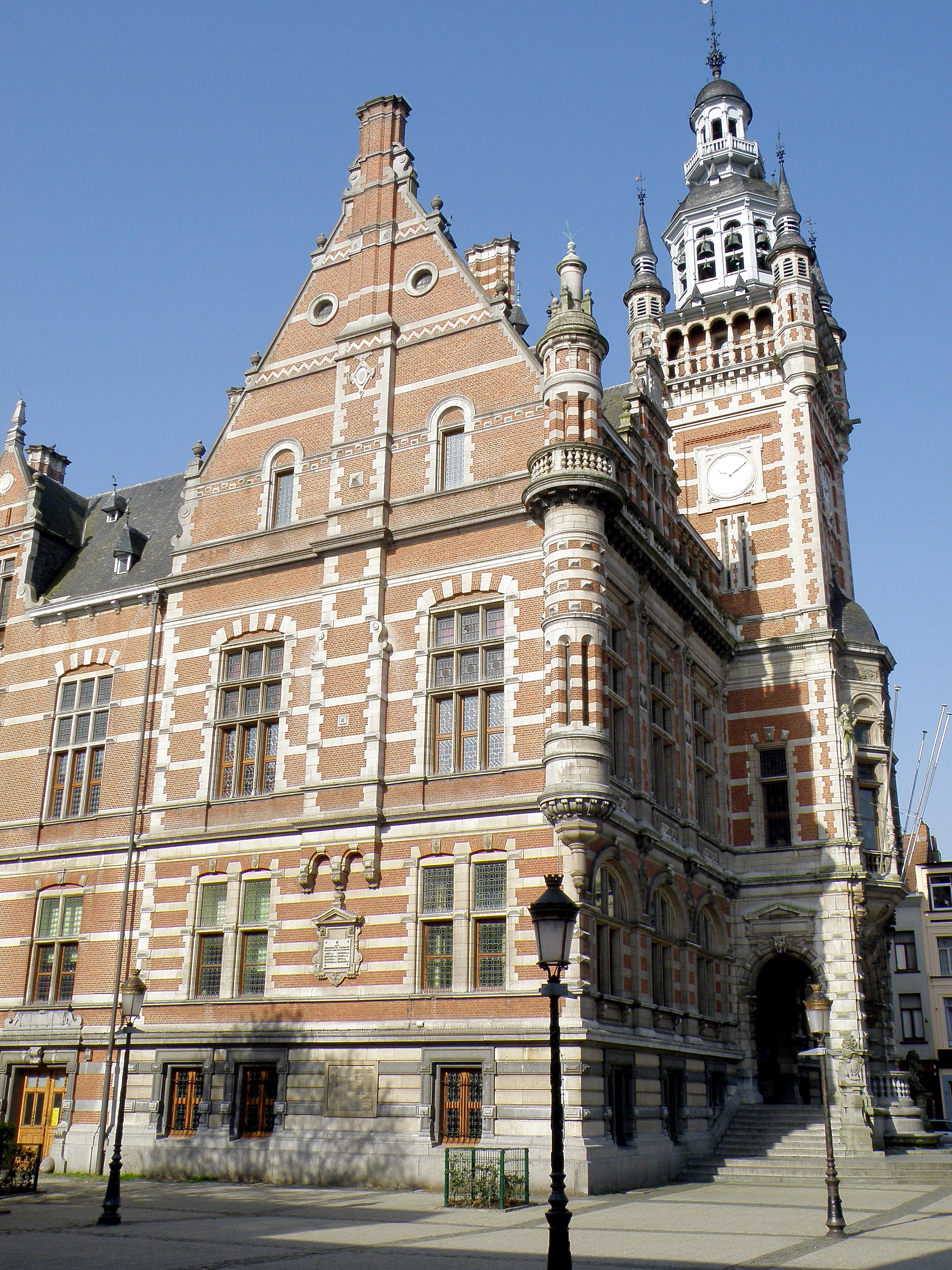 Districtshuis (voormalig gemeentehuis) van Borgerhout. Oostgevel links en (schuin zicht op) noordgevel=hoofdgevel rechts.